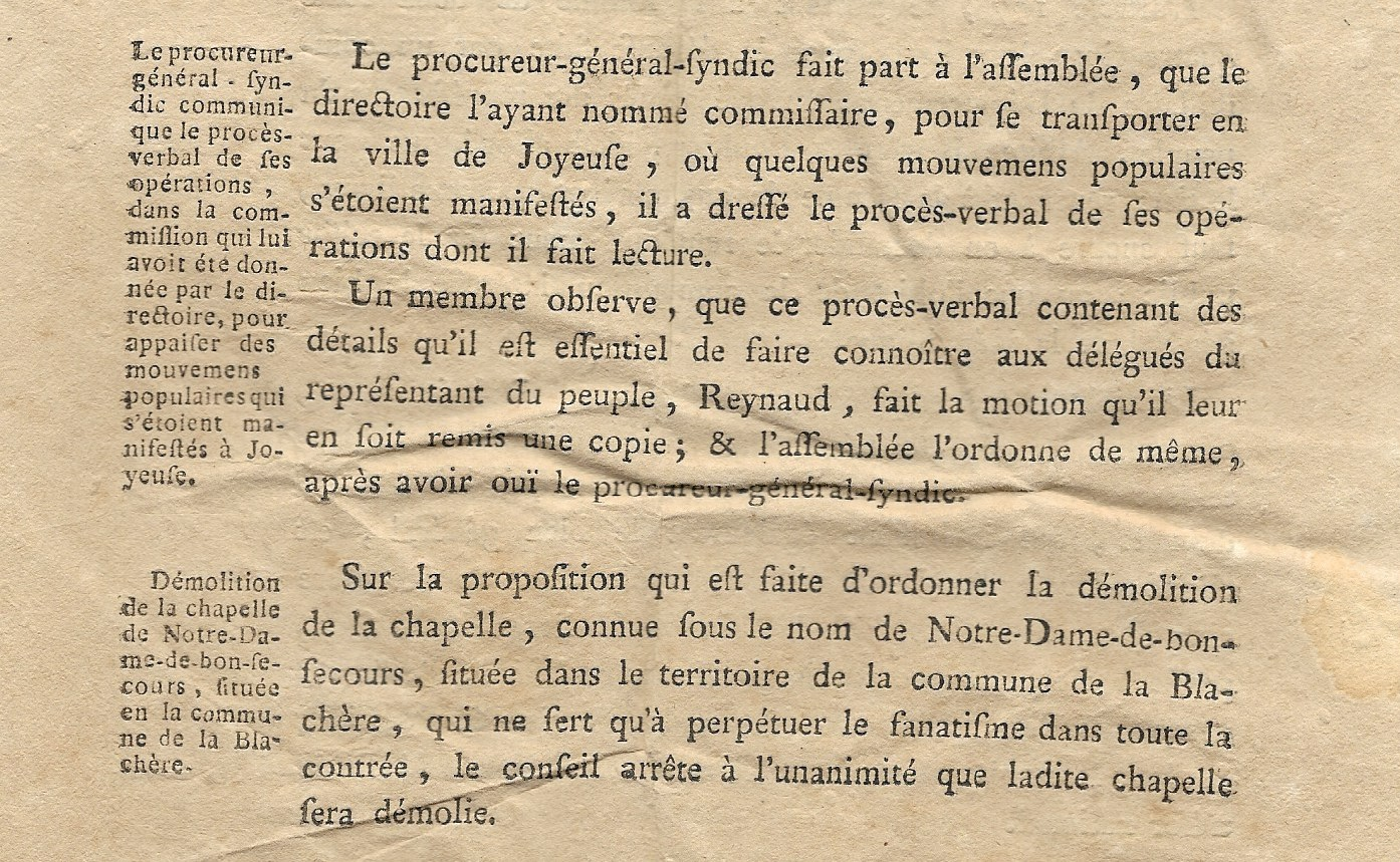 Extraits des délibérations du Directoire de l'Ardèche 1794